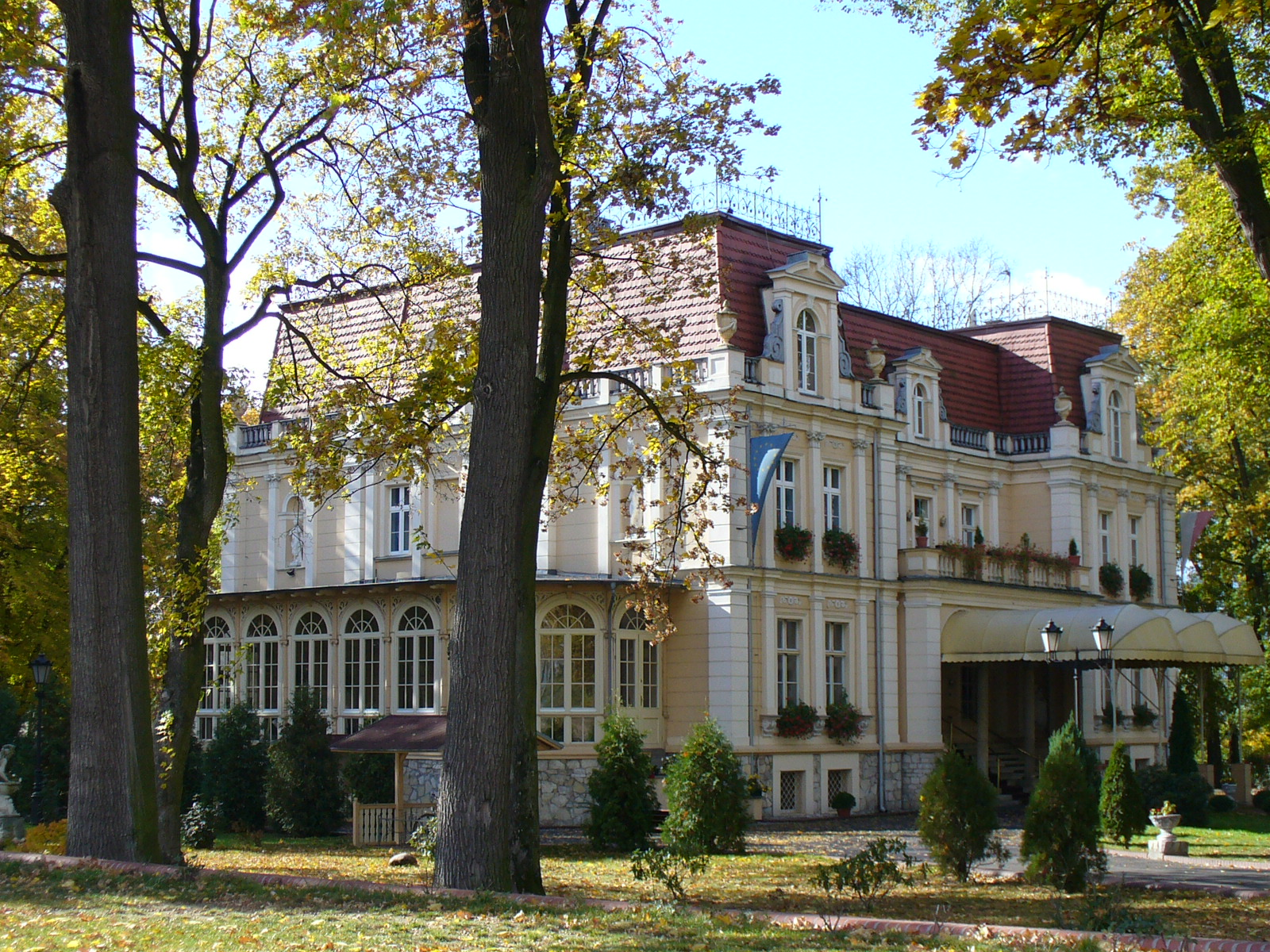 Schloss in Niewodnik (Fischbach/Oberschlesien) / Pałac w Niewodnikach (Górny Śląsk)